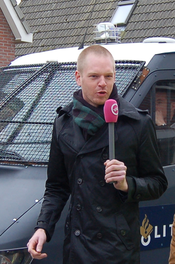 Jelte Sondij (GeenStijl) interviewt een persvoorlichter van de politie.Foto gemaakt tijdens de NVU-demonstratie in Ede.